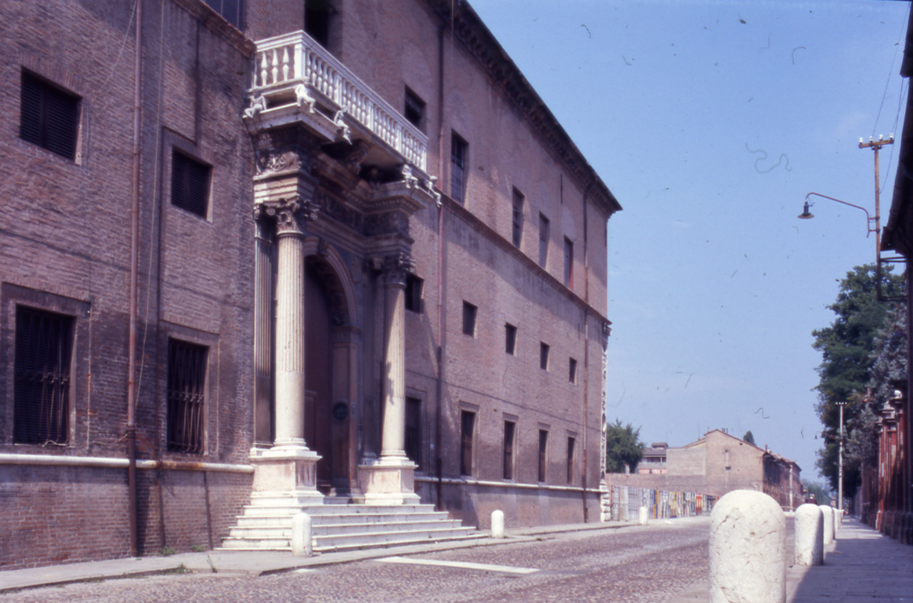 Serie fotografica : Italia, 1982 / Paolo Monti. - Strisce: 3, Fotogrammi complessivi: 3 : Diapositiva, sviluppo cromogeno/ pellicola ; 35 mm